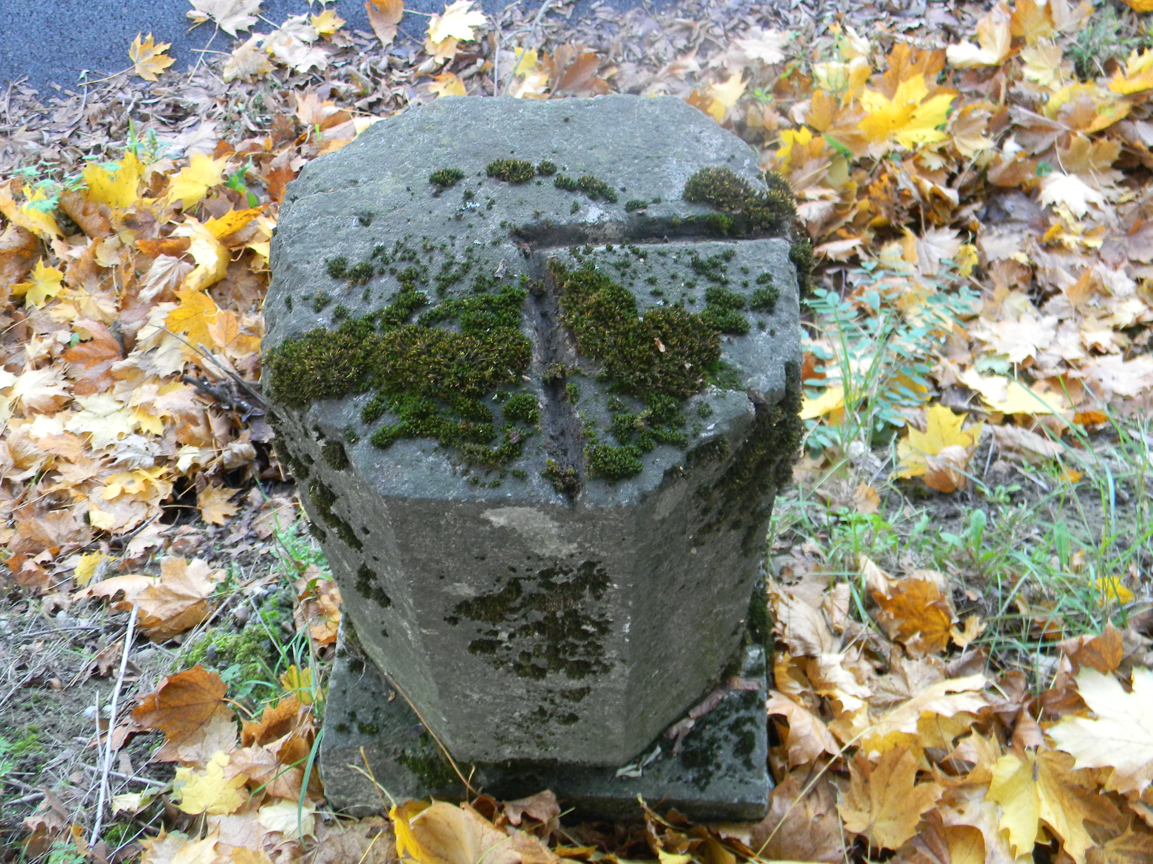 Une borne en calcaire délimitant le territoire militaire autour du fort de Meyzieu. Les deux traits représentent les directions vers les prochaines bornes similaires.